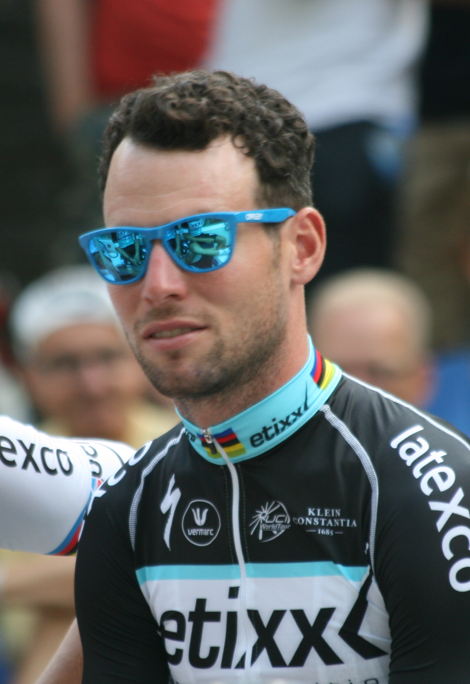 ploegenpresentatie Tour de France 2015 Utrecht